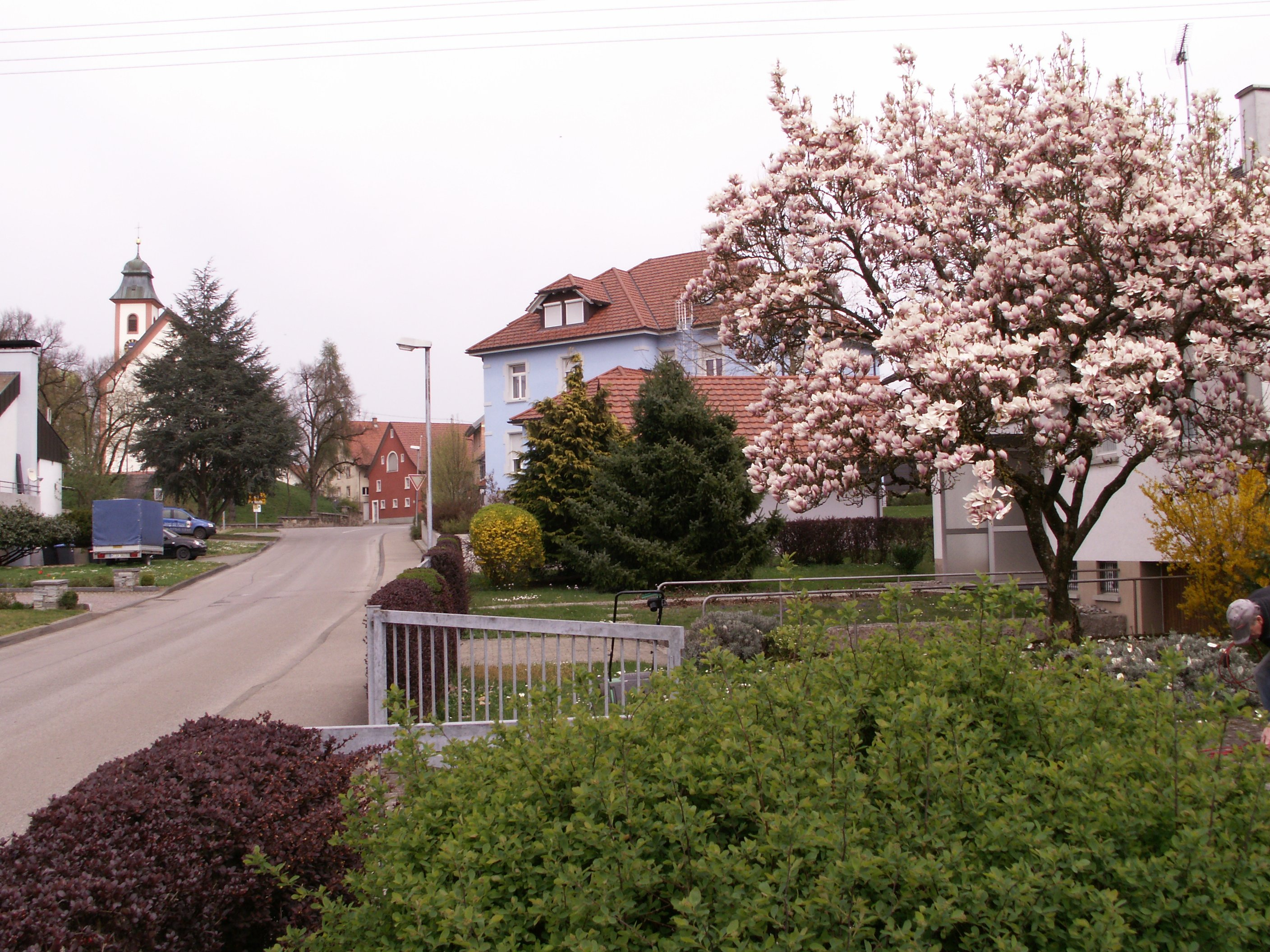 Schwerzen